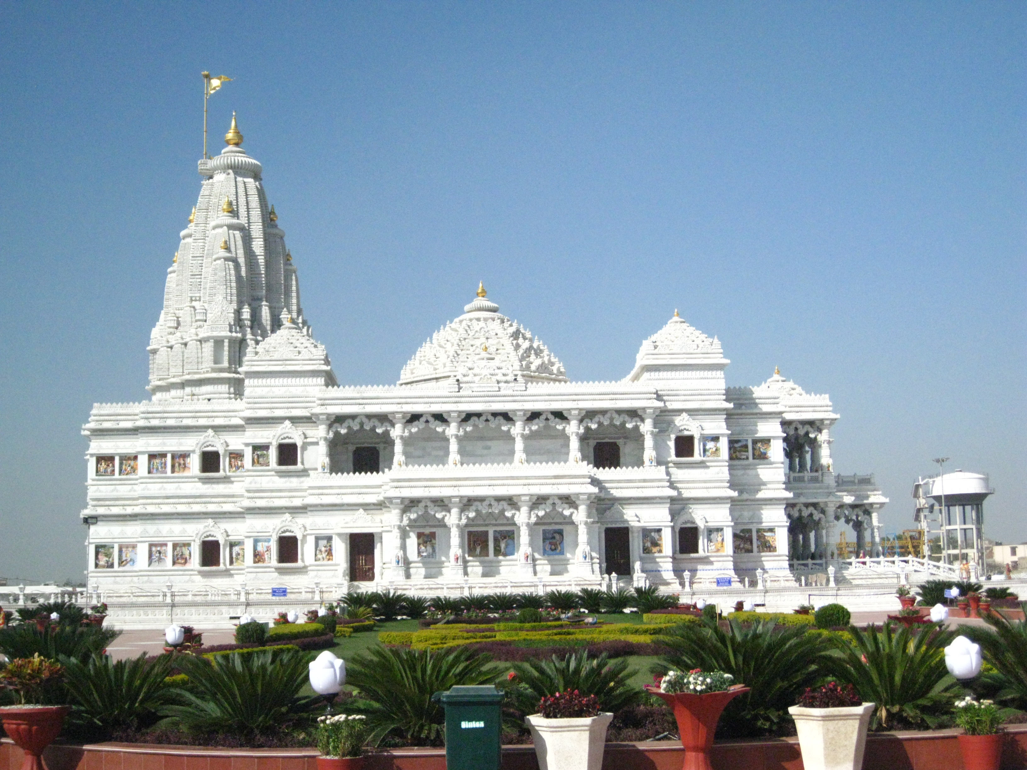 Prem Mandir, Vrindavan, Mathura, Uttar Pradesh Built by Jagadguru Kripalu ji Maharaj/ Jagadguru Kripalu Parishat